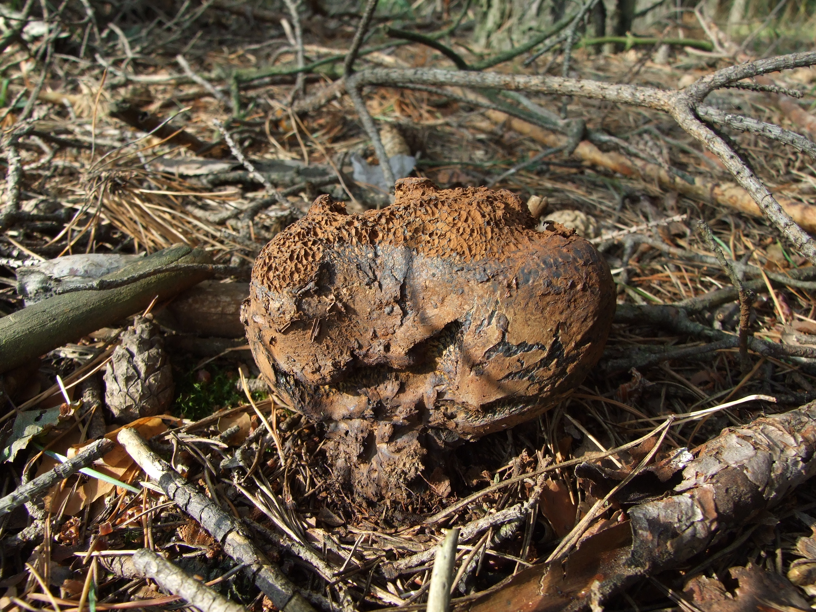 Purchatnica piaskowa